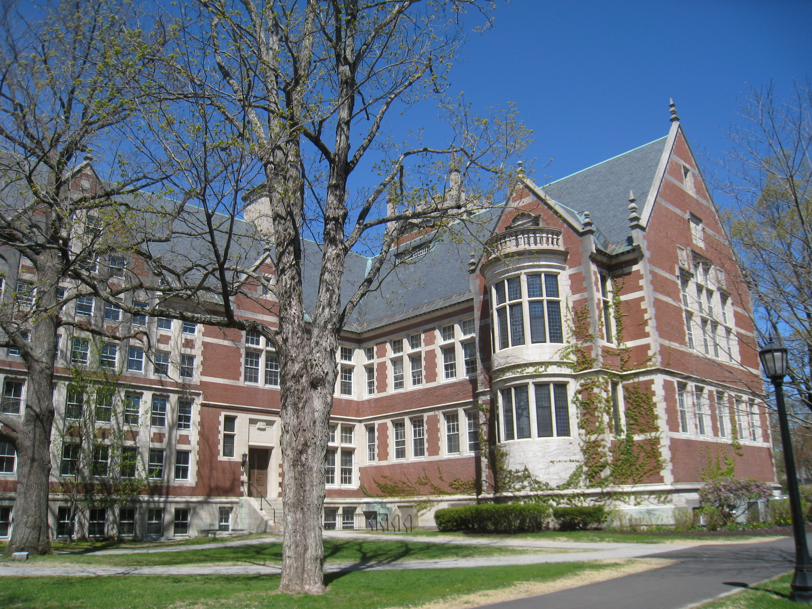 Hubbard Hall, Bowdoin College, Brunswick, Maine, USA.